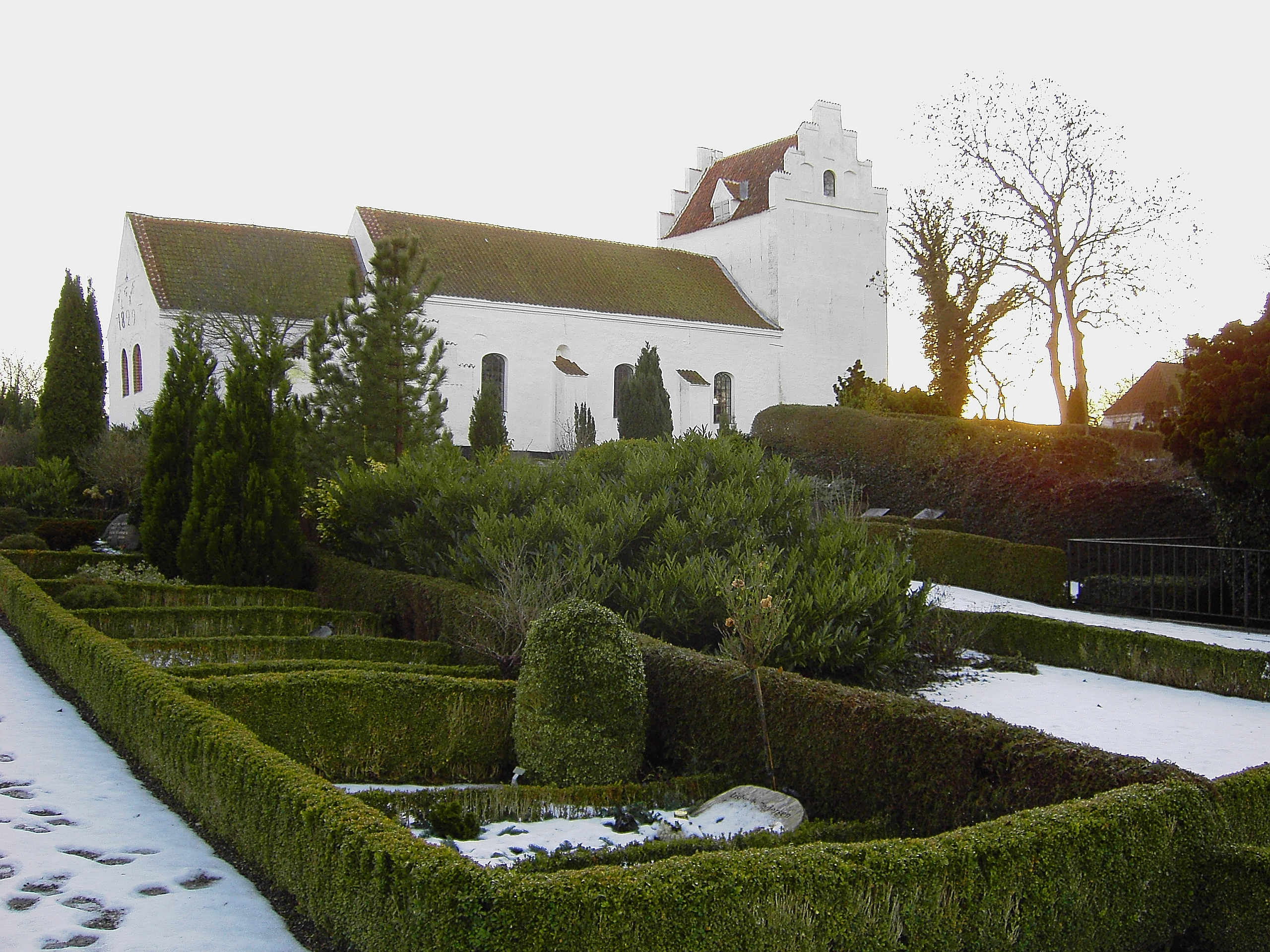 Bøstrup Kirke ses nede bagfra i Kirkegården